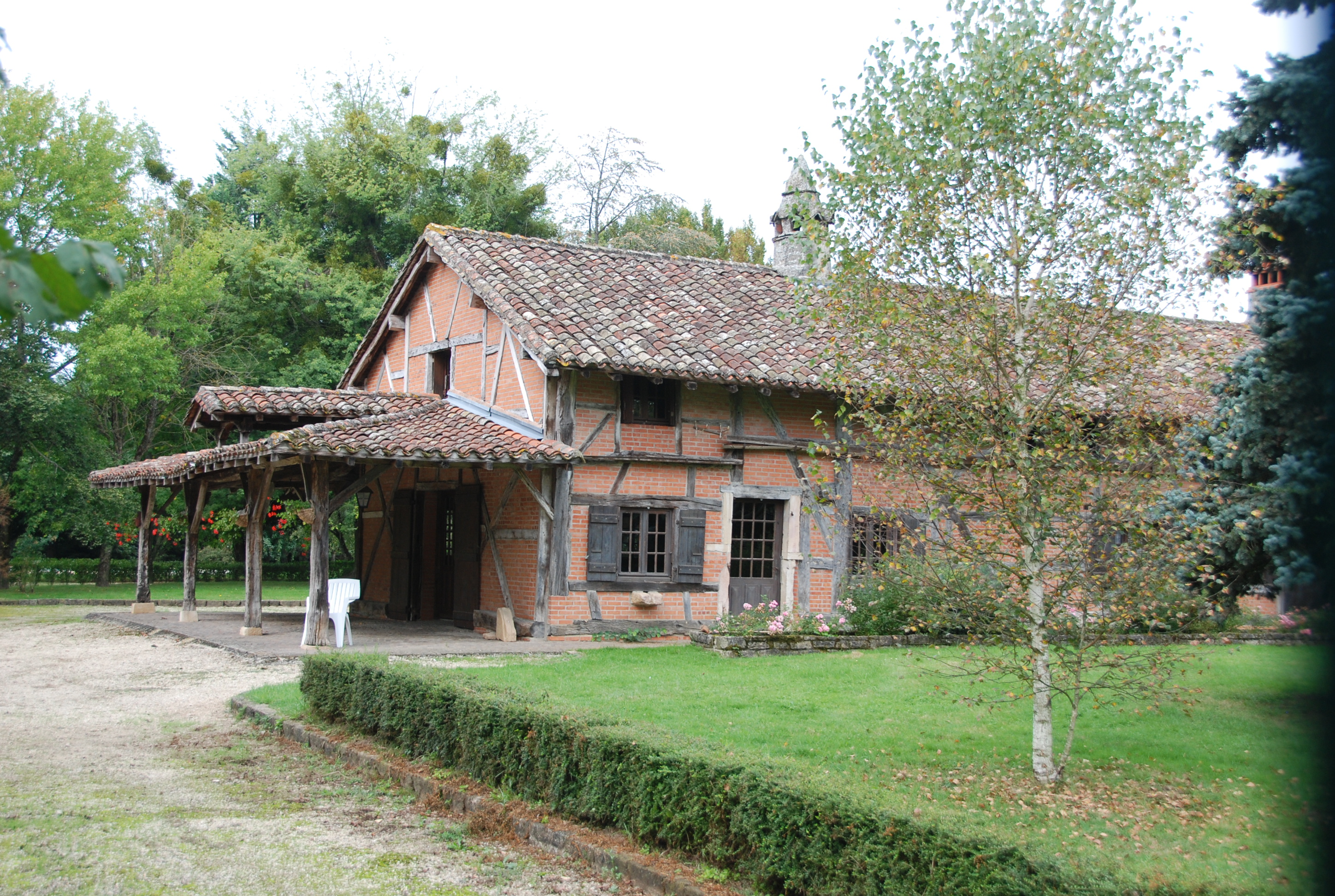 Ferme de la Bourlière, La Bourlière (Inscrit, 1925) .